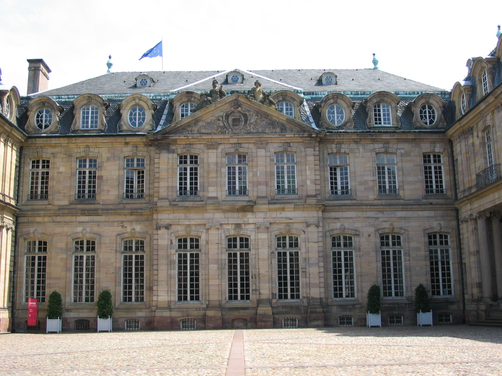 Vue de la cour intérieure du Palais des Rohan de Strasbourg. Photo prise par Denis Helfer le 25 juin 2006.